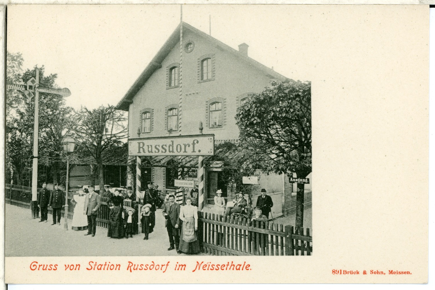 Russdorf; im Neißetal, Bahnhof This postcard is from publisher Brück & Sohn in Meißen ( postcard has a unique number 00891 and is available in a higher resolution at the publisher. This images was uploaded in a cooperation project between Wikipedians and the publisher.